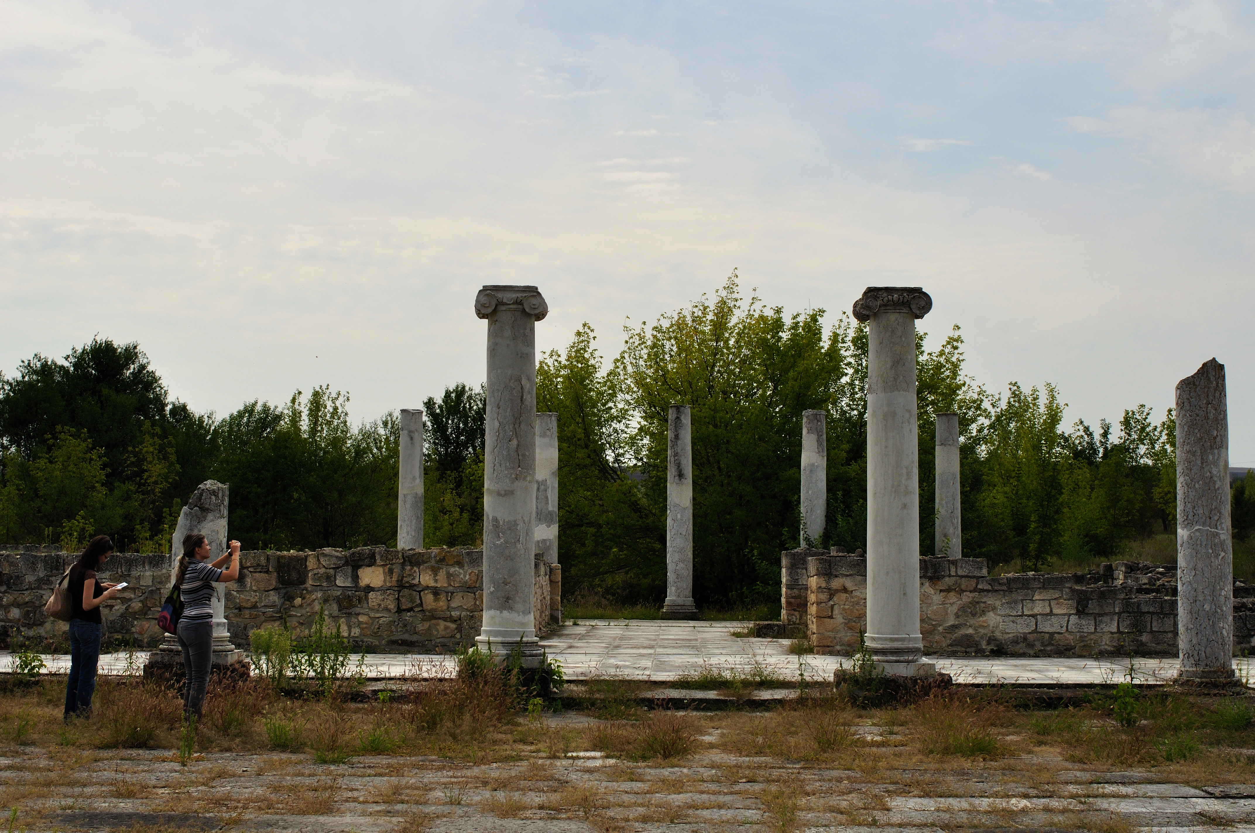 Атриум е "двор". Абритус е имал чуден двор, подобен на дворът от 300, където спартанците са се учили да се бият. Предполагам тази организация на сградата е взаимствана от гърците. Atrium means 'a yard'. Abritus had a great yard similar to the yard in the movie '300' where the Spartans learned to fight. I guess the structure was influenced by the Greeks.